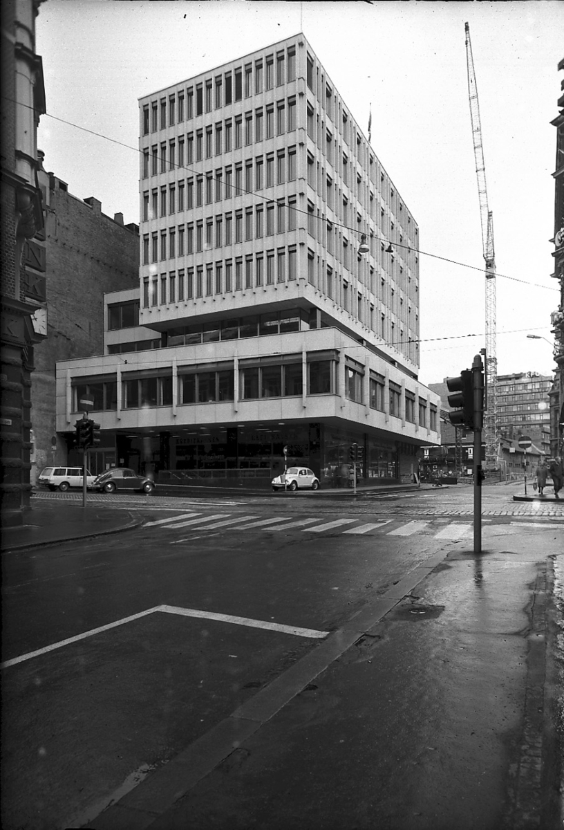 Kreditkassens nye hovedbygg, Karl Johans gate 15 / Stortorvet 6, 1969.